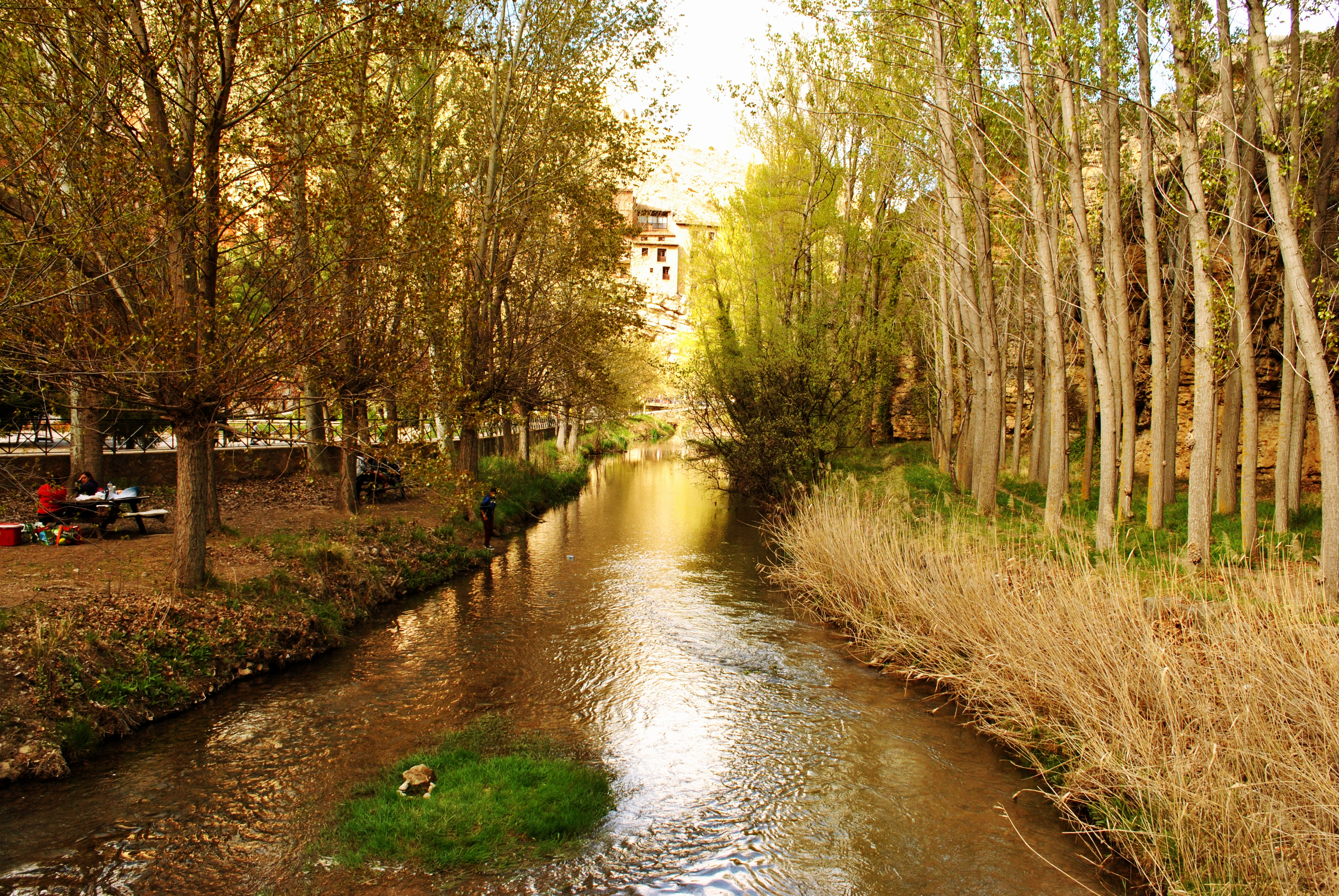 Río Guadalaviar, a su paso por Albarracín